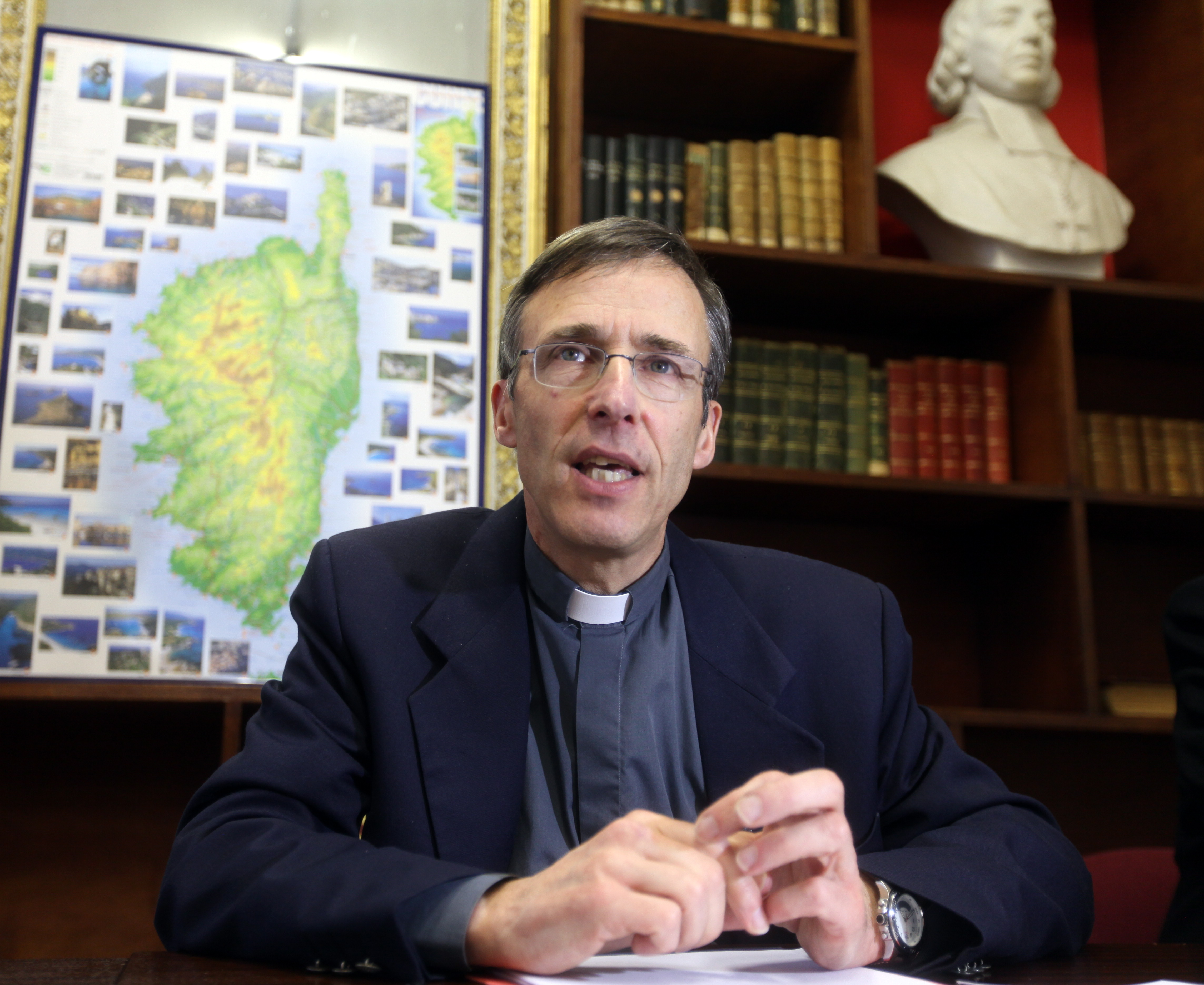 L'Evêque de Corse dans son bureau